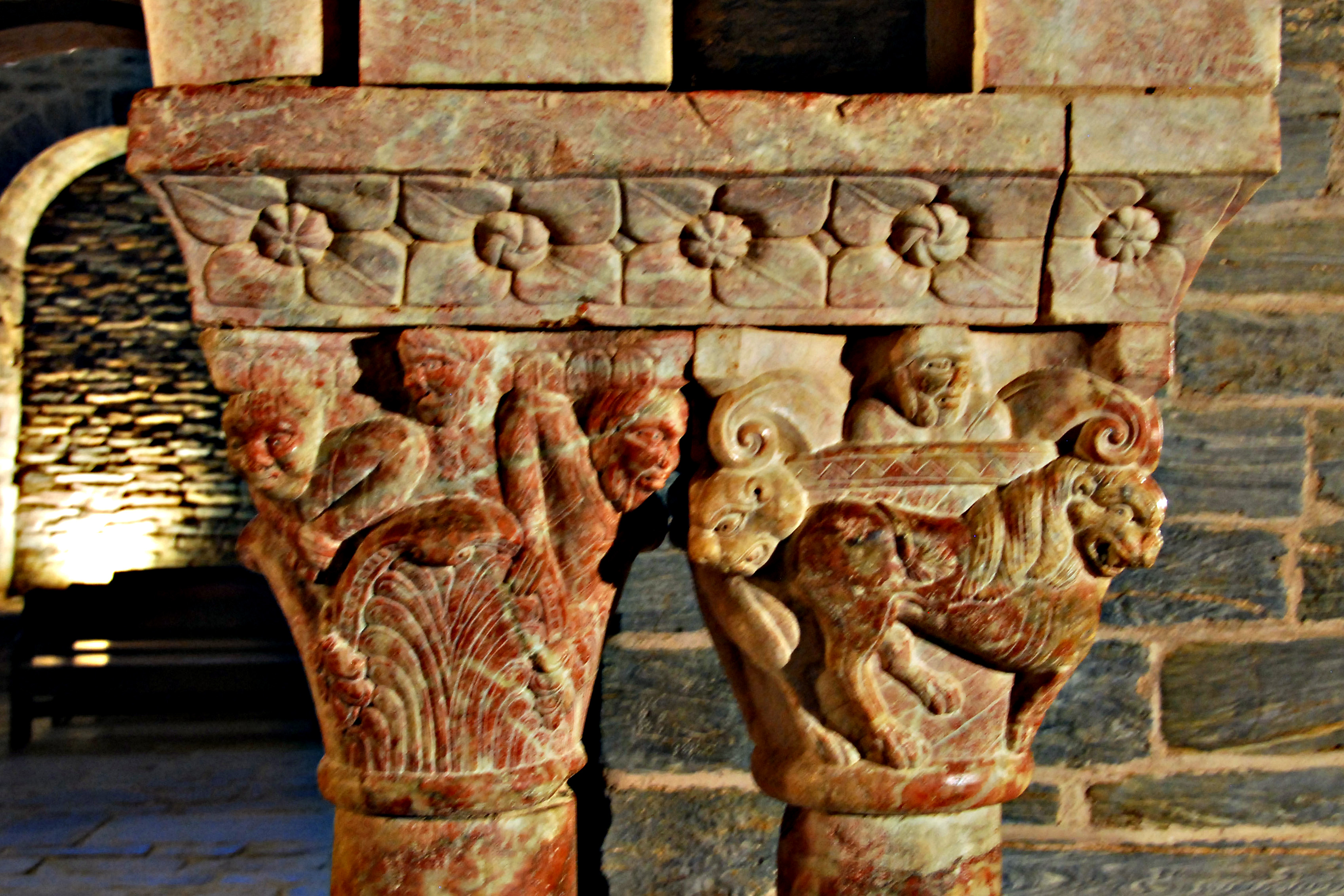 Serrabone, Empore, Kapitelle Nr 5+6